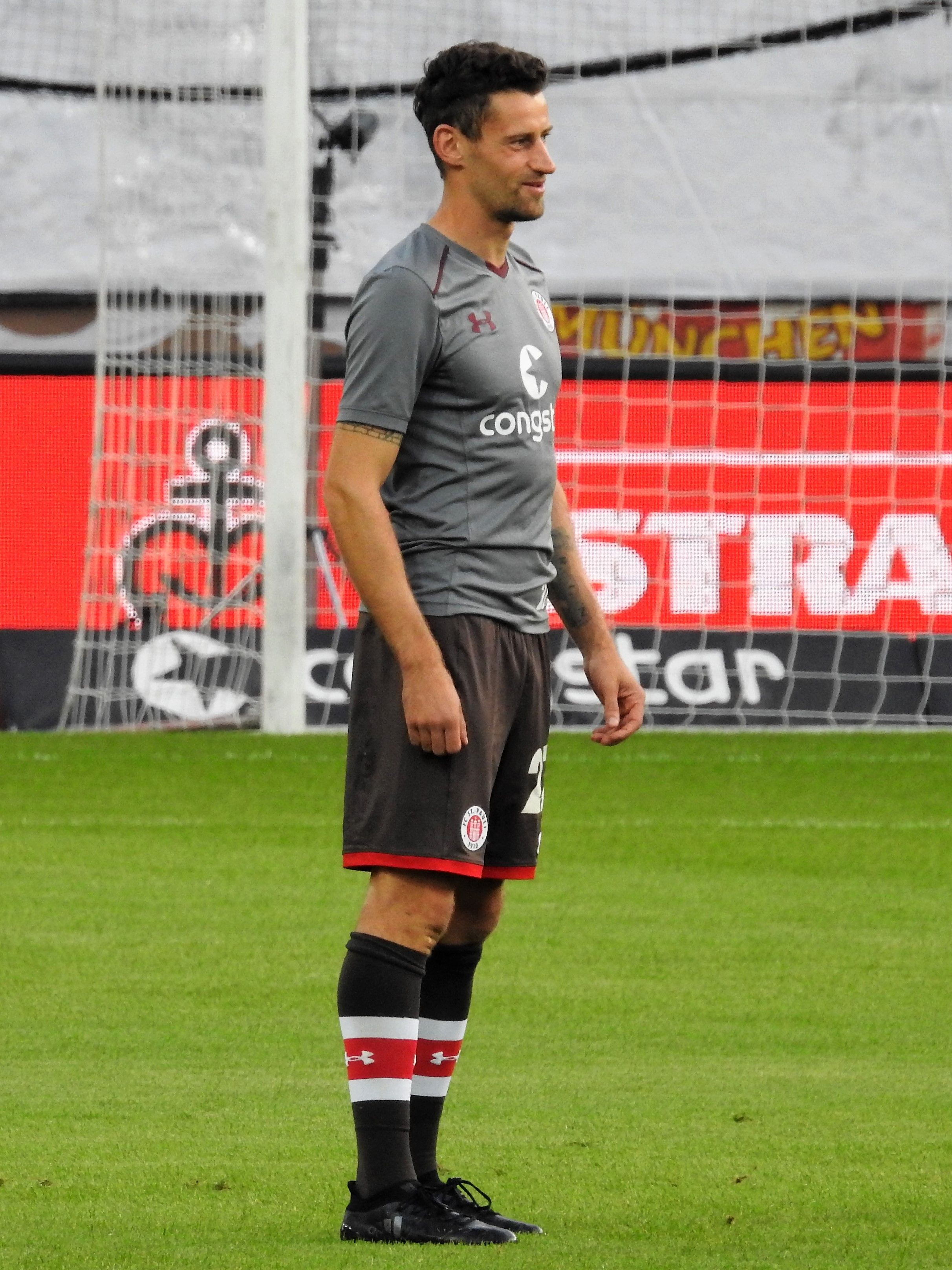 Jan-Philip Kalla FC St.Pauli